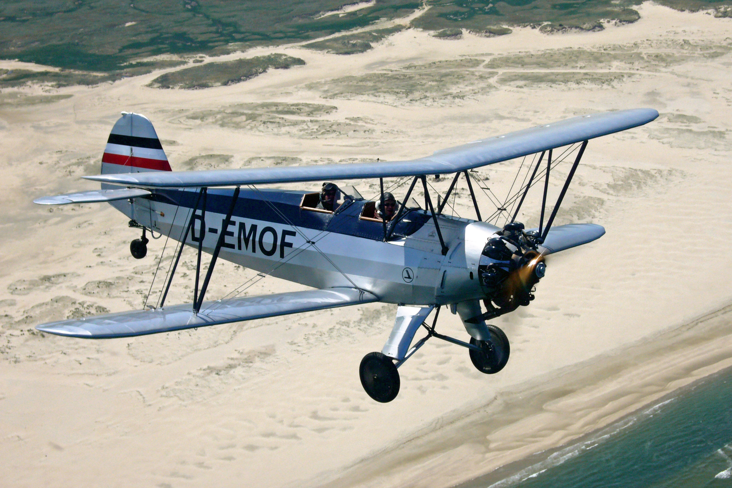 Focke Wulf Fw 44 "Stieglitz" über einer Nordseeinsel